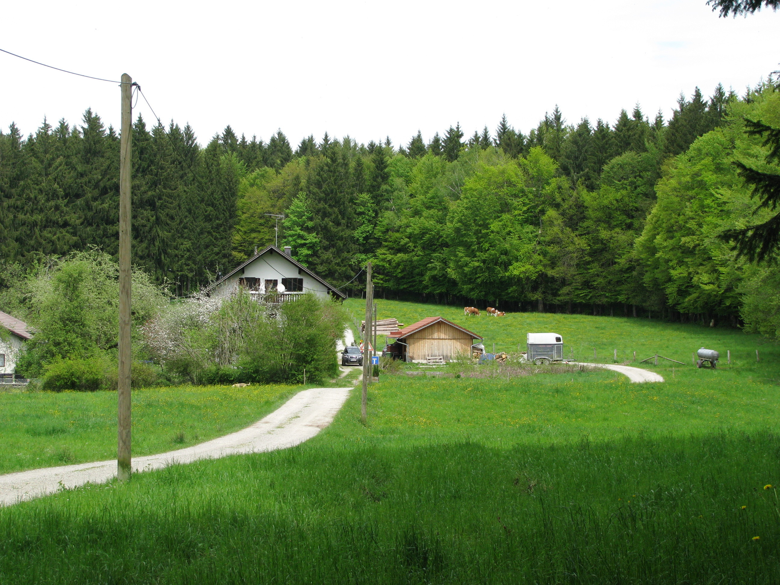 Einöde Schuß, Gemeinde Königsdorf